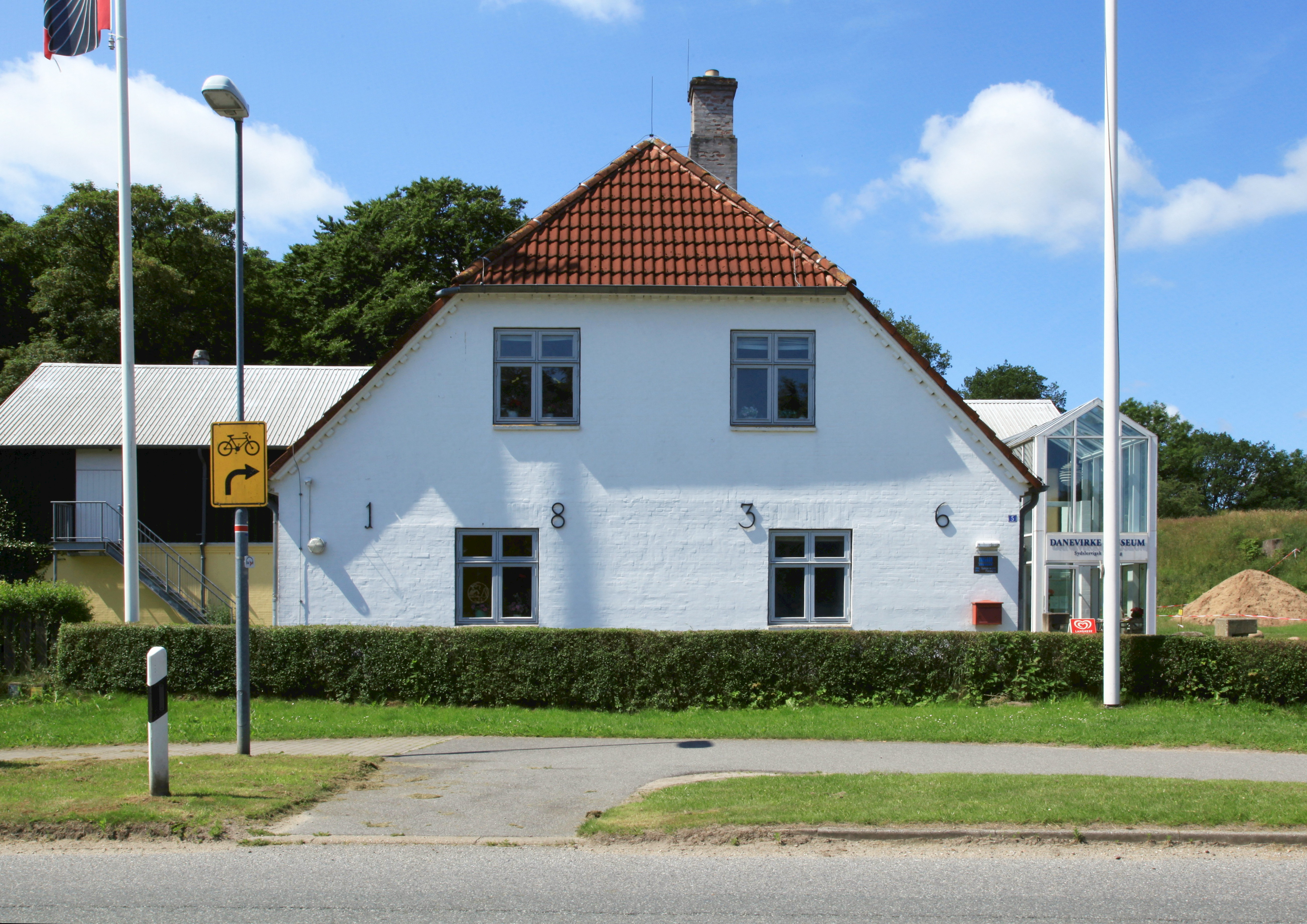 Danewerk Museum an der Straße Ochsenweg in Dannewerk